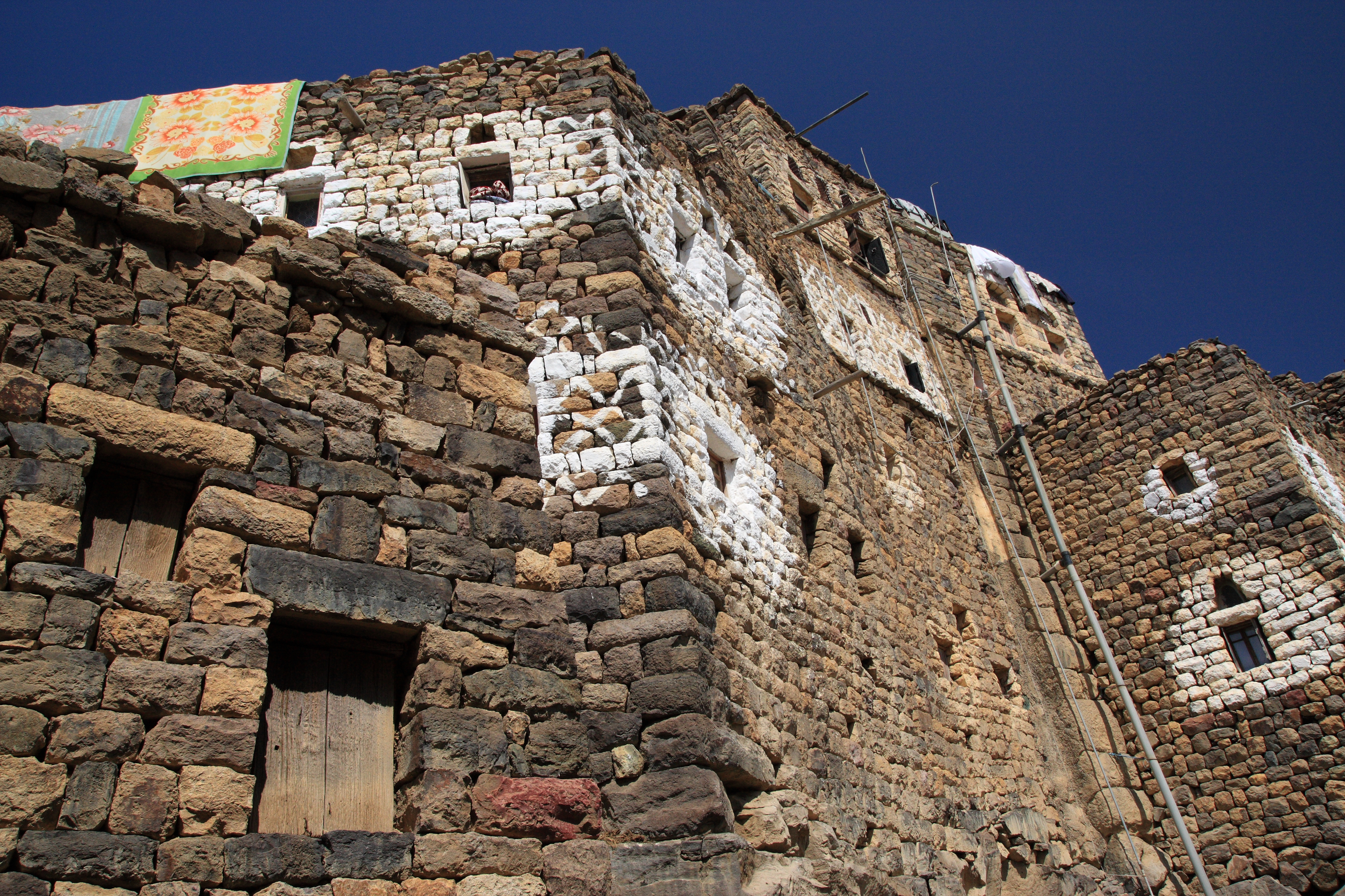 Al Hajjarah